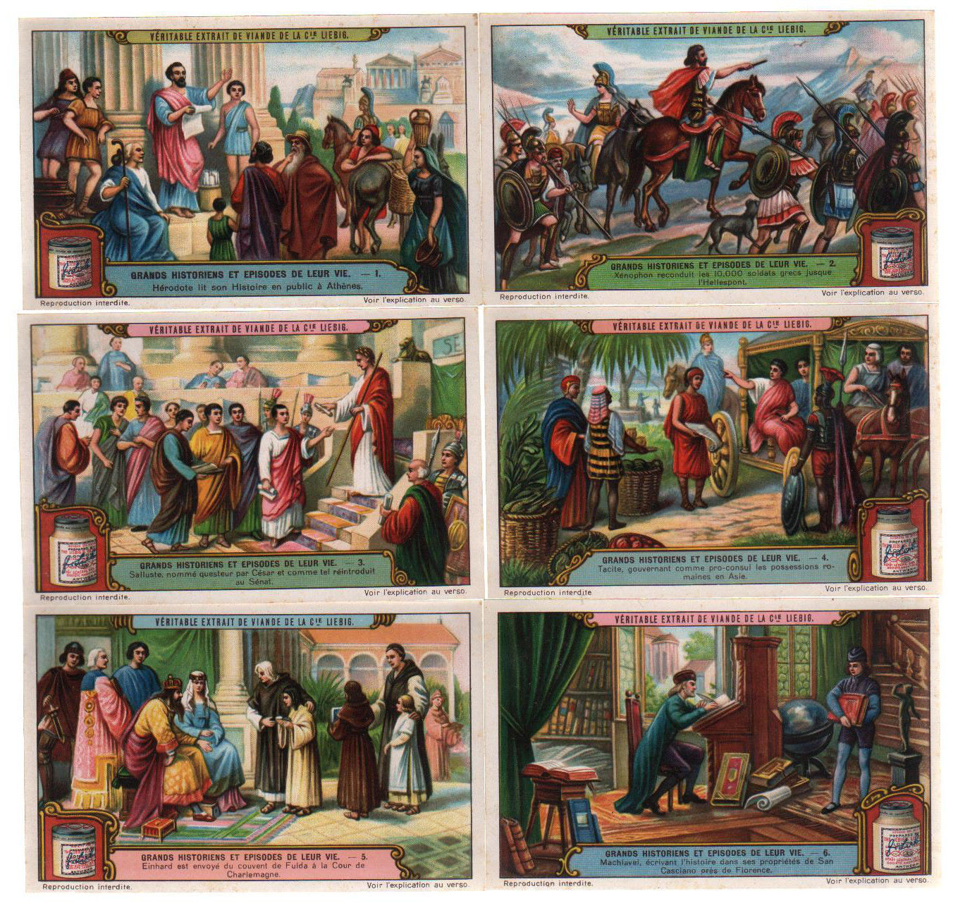 Liebig card set "Grands historiens et episodes de leur vie"